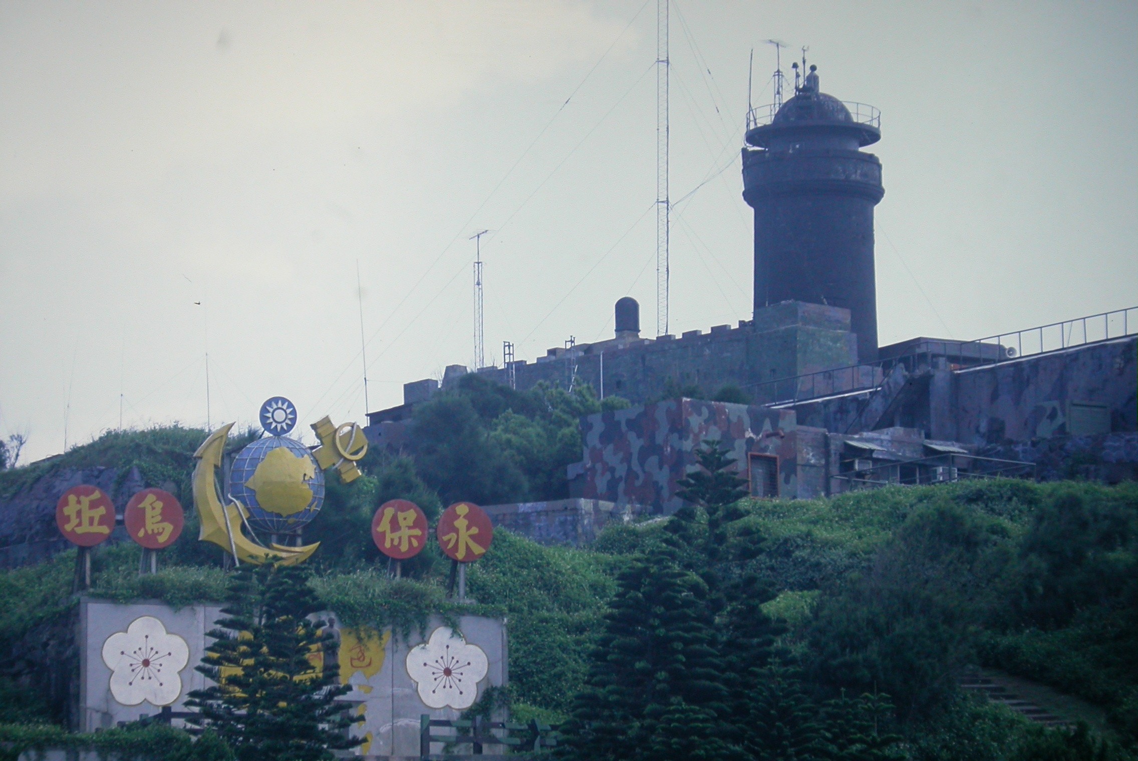 烏坵嶼以及百年燈塔